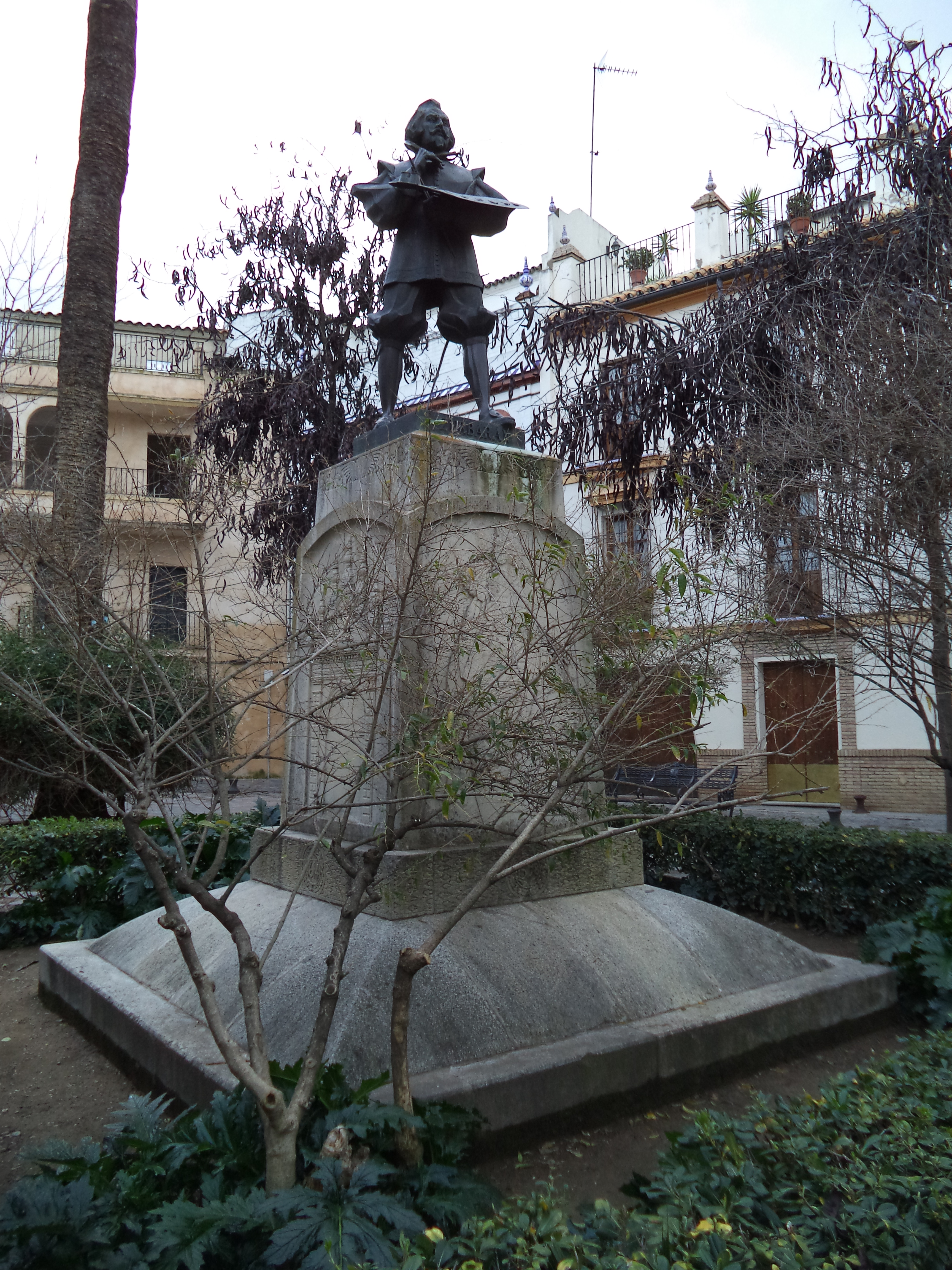 Monumento a Zurbarán. Fue realizado en 1929 para la Exposición Iberoamericana de Sevilla y estuvo situado en el Parque de María Luisa de la localidad hasta los años 50, cuando fue trasladado a la Plaza de Pilatos de la localidad. El pedestal está decorado con relieves: el frontal del cuadro del pintor de Santa Casilda, y los tres lados restantes con la Puerta de la Macarena de la muralla sevillana, la Torre del Oro tal y como debió ser hace siglos y el escudo de la localidad de Fuente de Cantos.